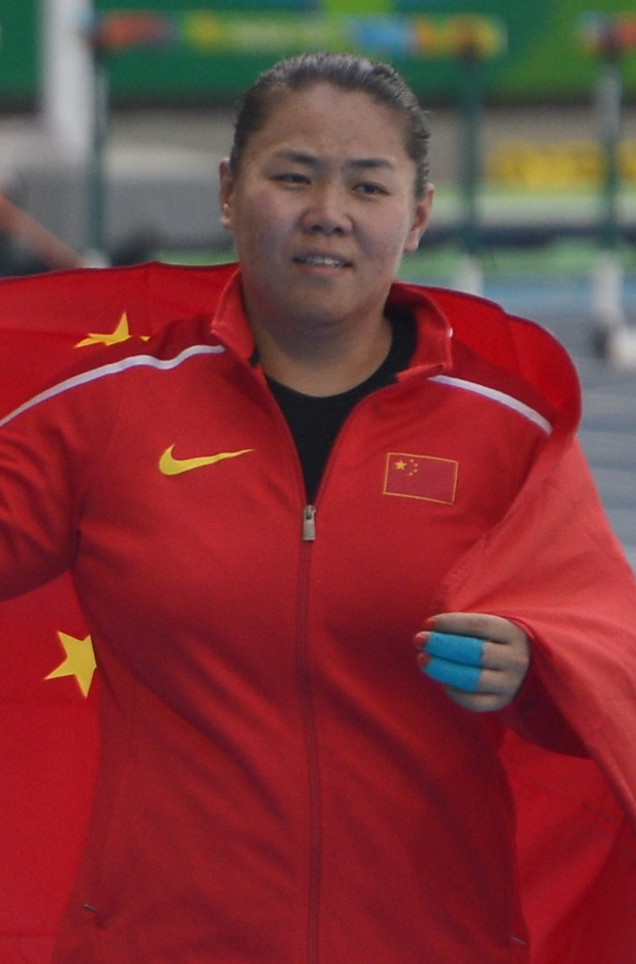 Zhang Wenxiu défilant après avoir obtenu la médaille d'argent au lancer du marteau aux JO de Rio 2016